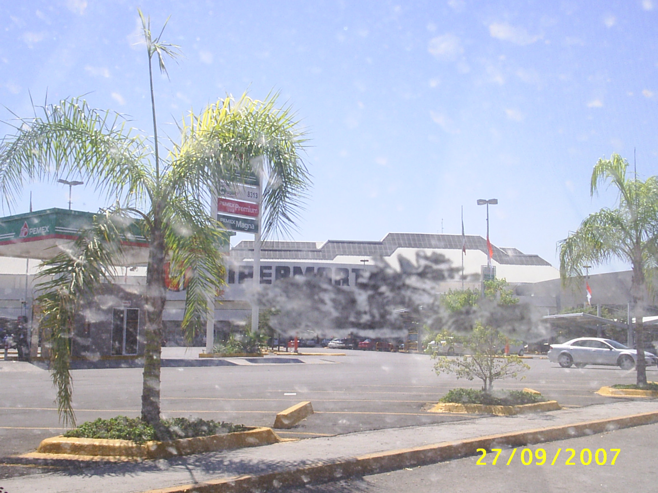 Hipermart Independencia